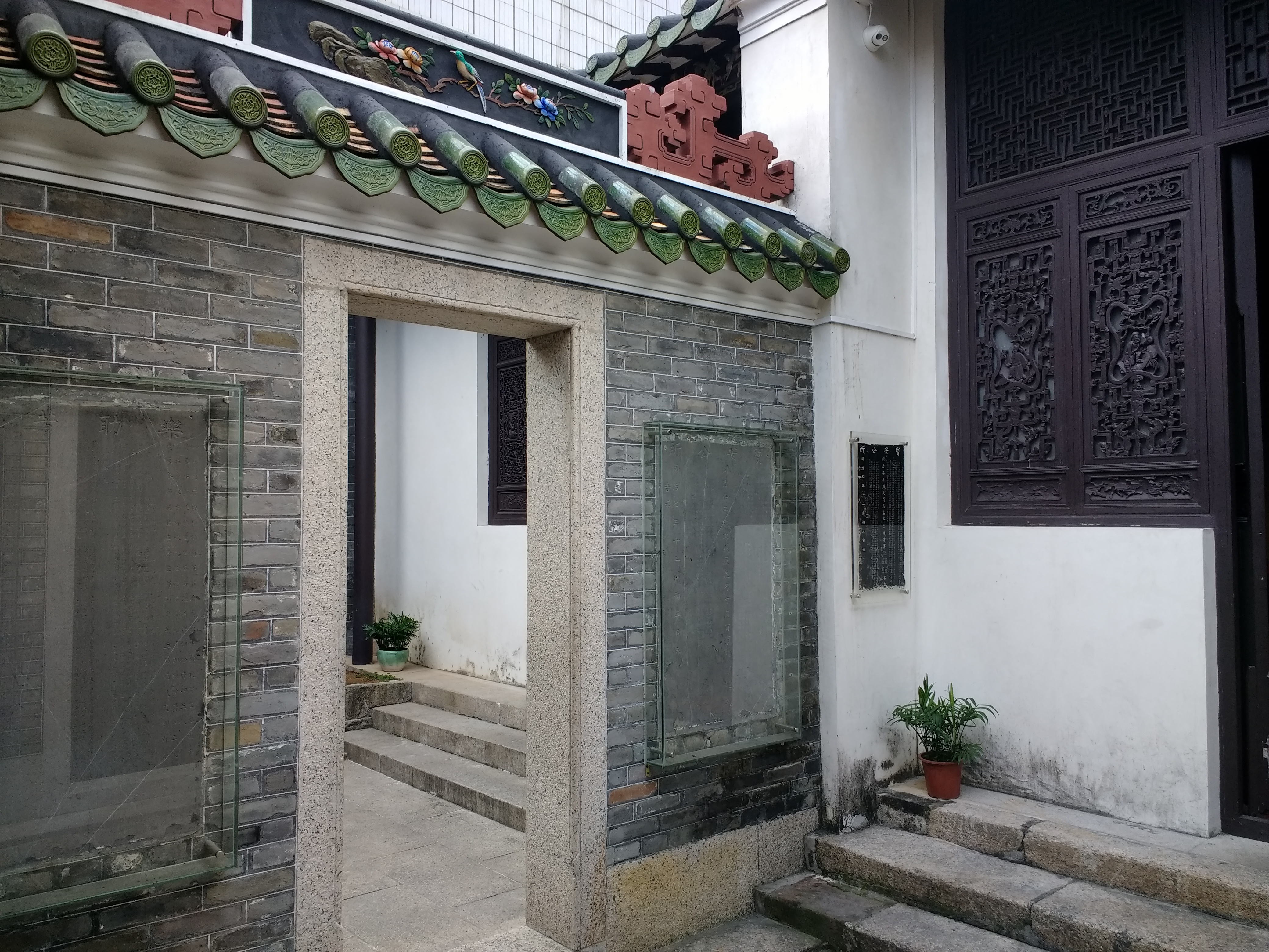 深圳南头古城东莞会馆